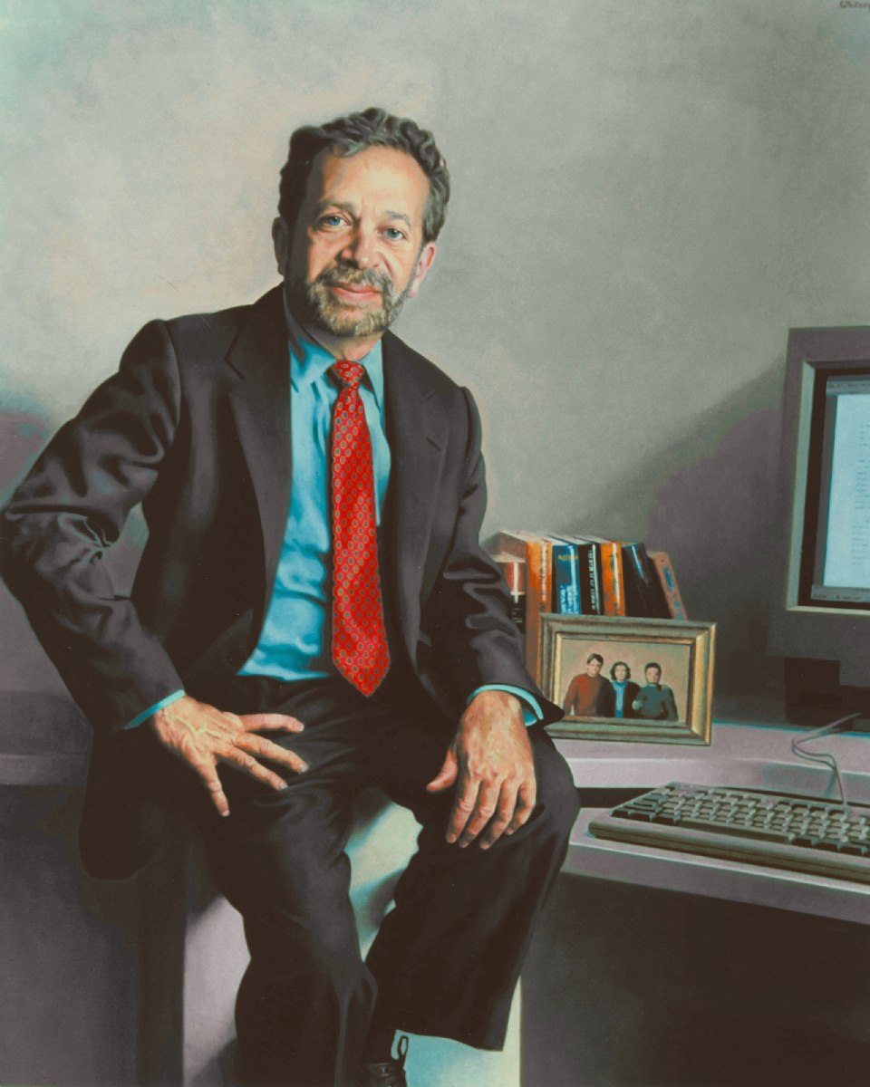 Rbreich